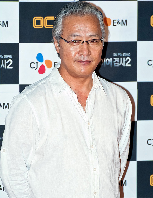 OCN 뱀파이어검사 시즌 2 시사회 및 제작발표회에 참가한 이경영